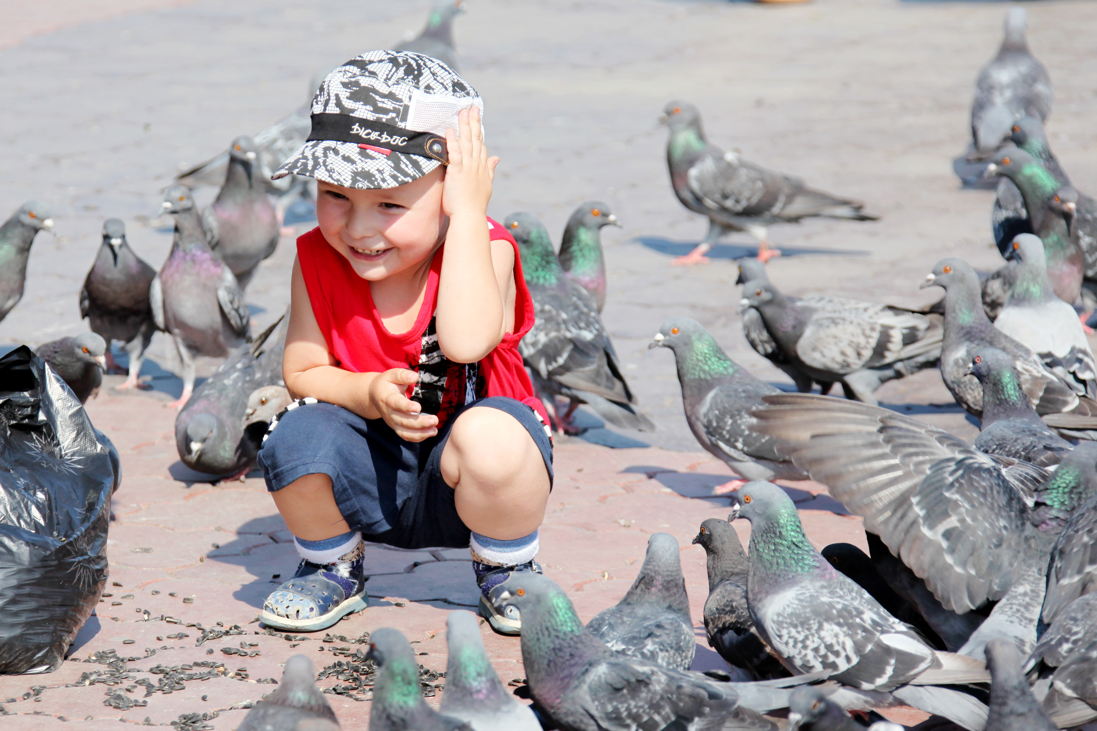 Knabo nutras kolombojn sur Placo de Unueco kaj Konsento. Tjumeno, Rusio.